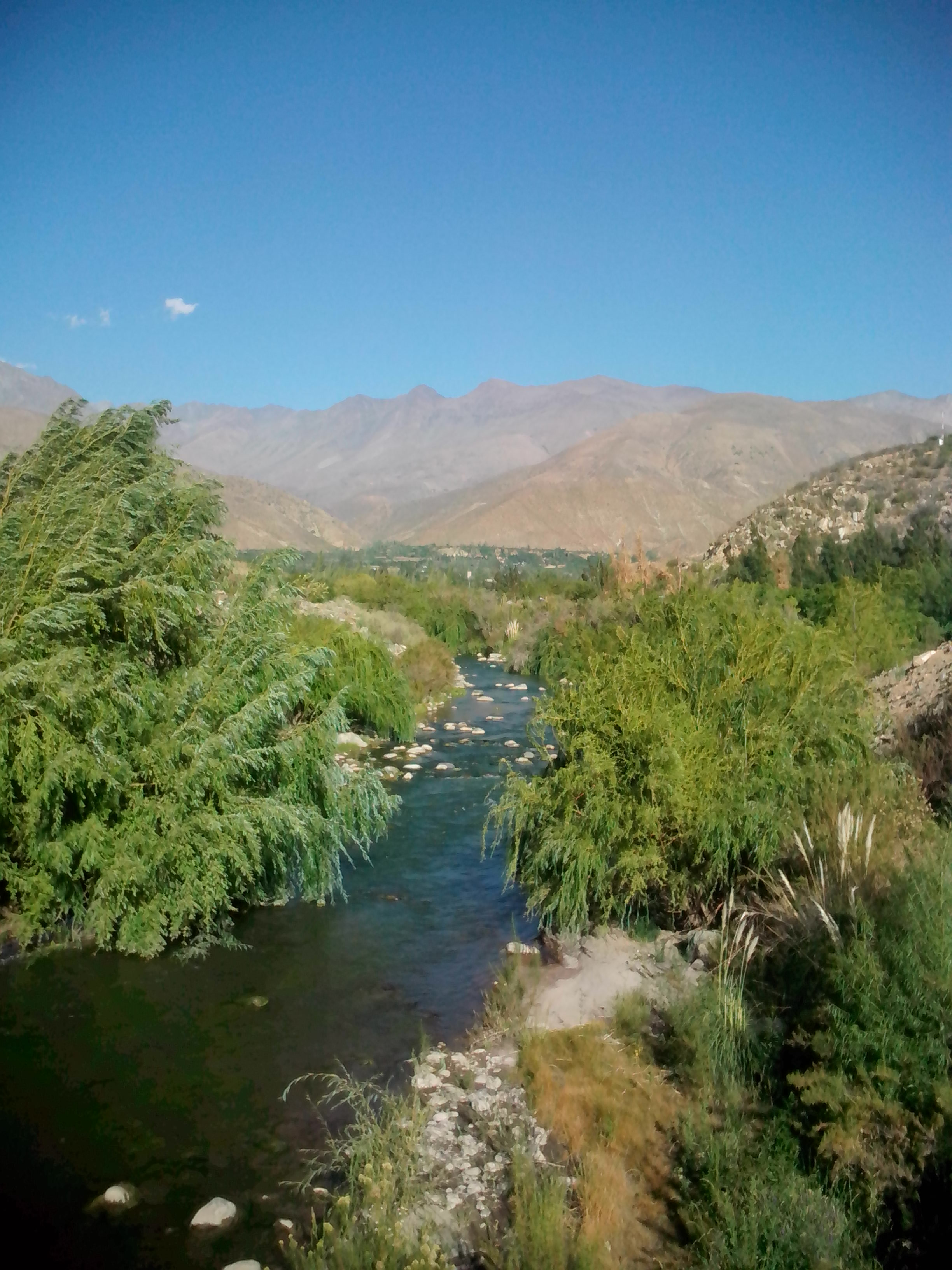 Río Cuncumen, Región de Coquimbo, Chile